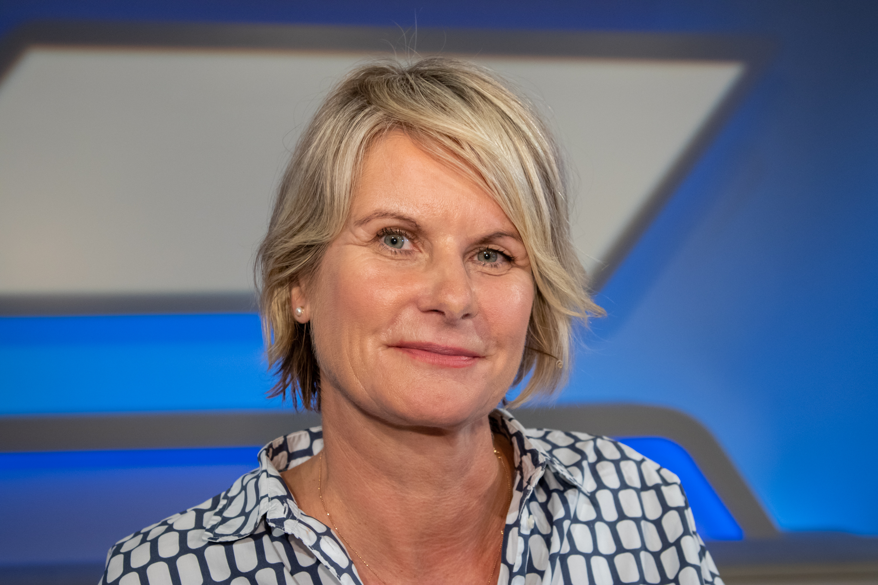 Susanne Gaschke in der WDR-Sendung "Maischberger. die woche" am 2019-08-28